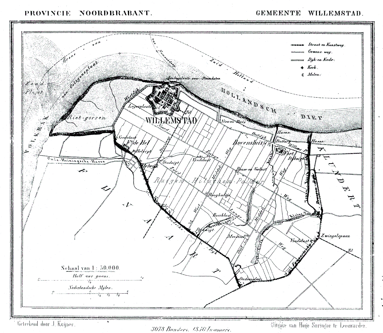 Nederland, Noord-Brabant, Gemeente Willemstad